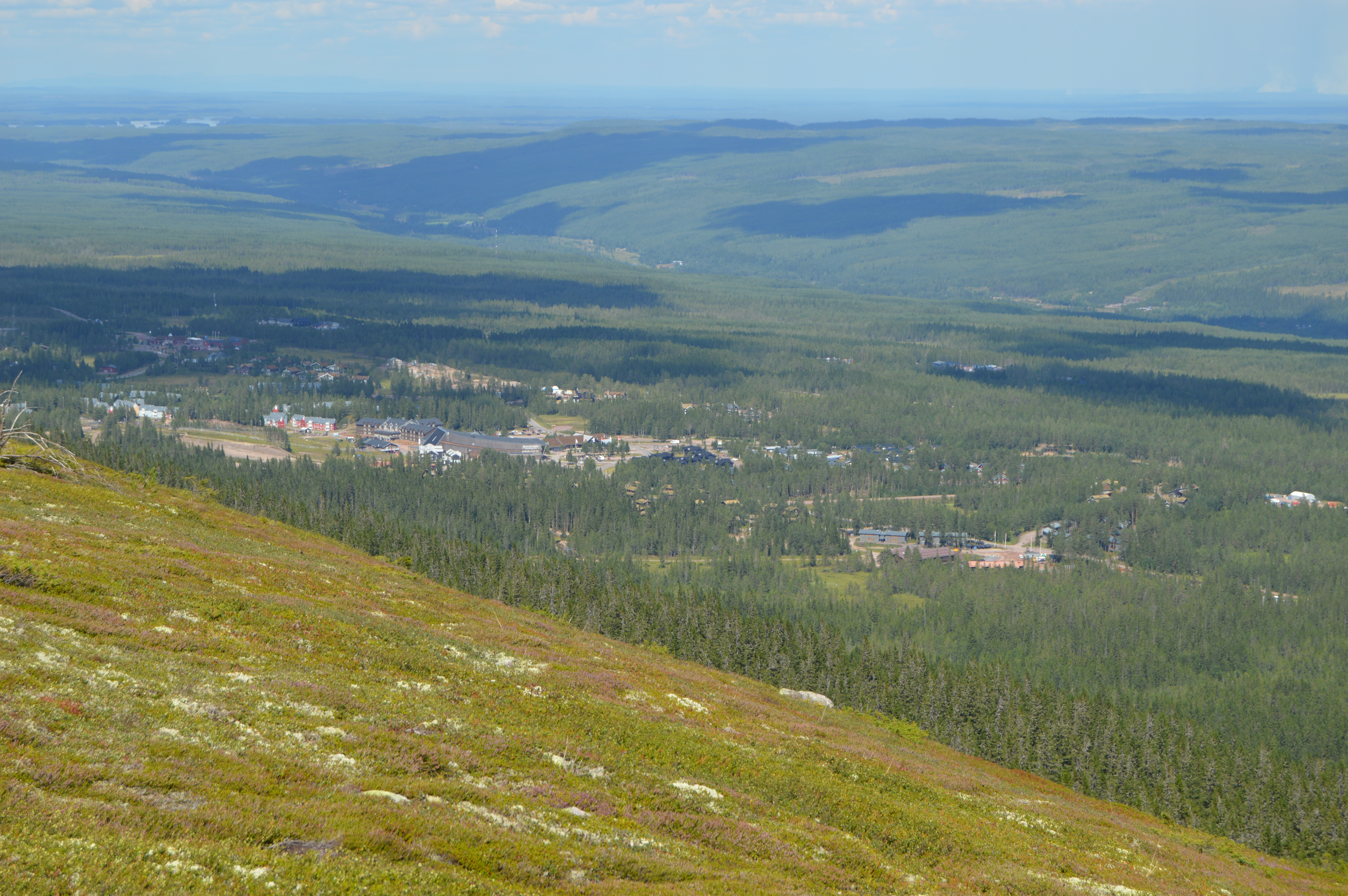 Lindvallen, sommaren 2018.